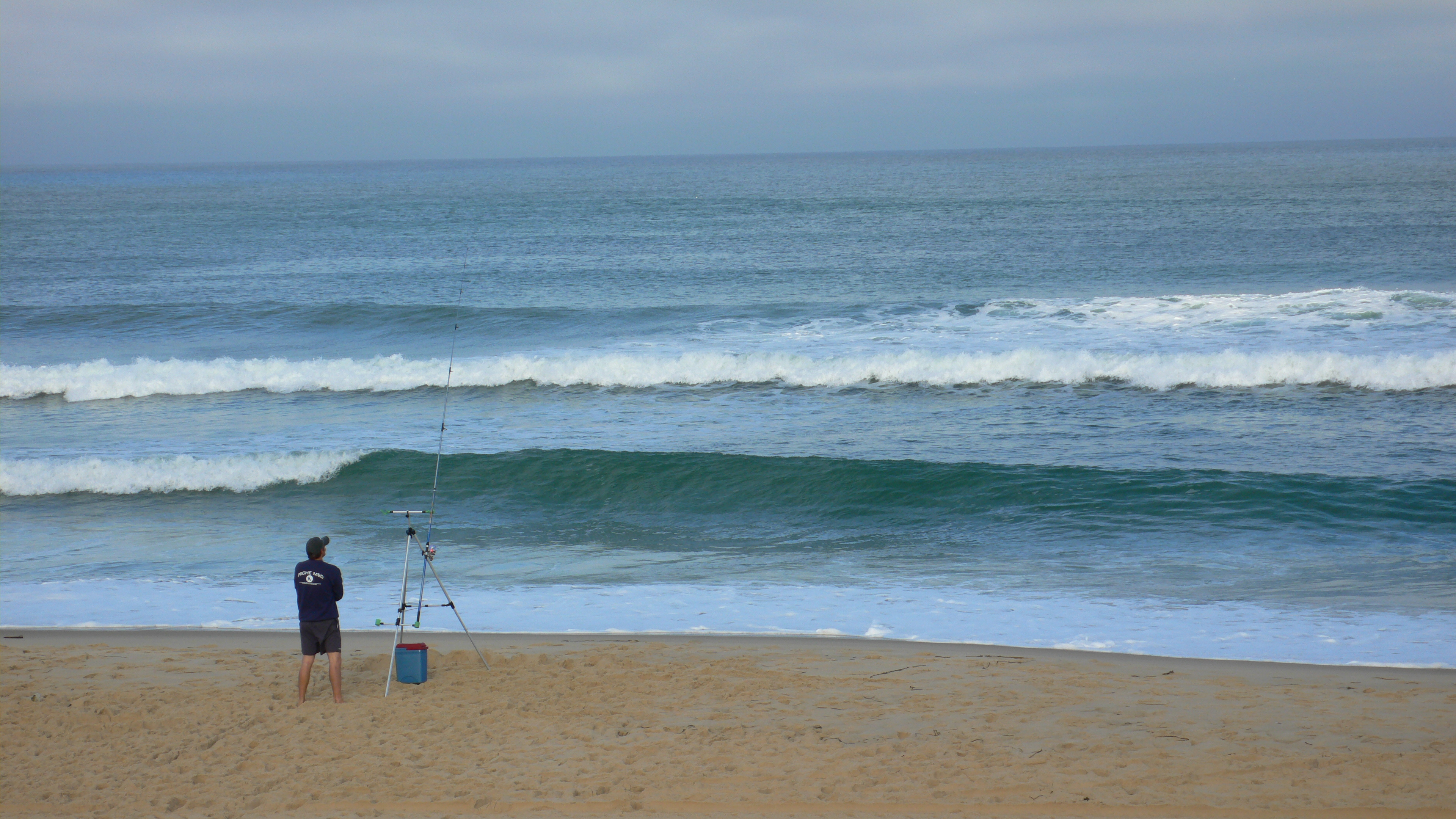 Surfcasting en Atlantique